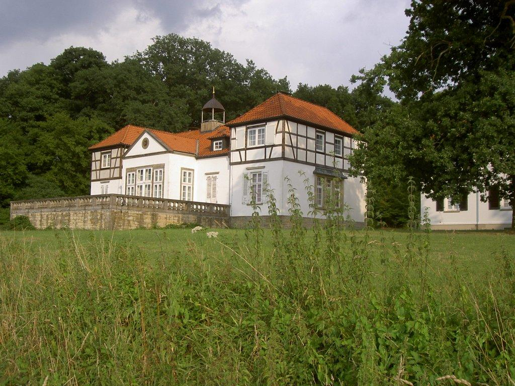 Das alte Gasthaus am Kehl